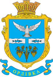 Герб села Орлівка (Ренійський район)